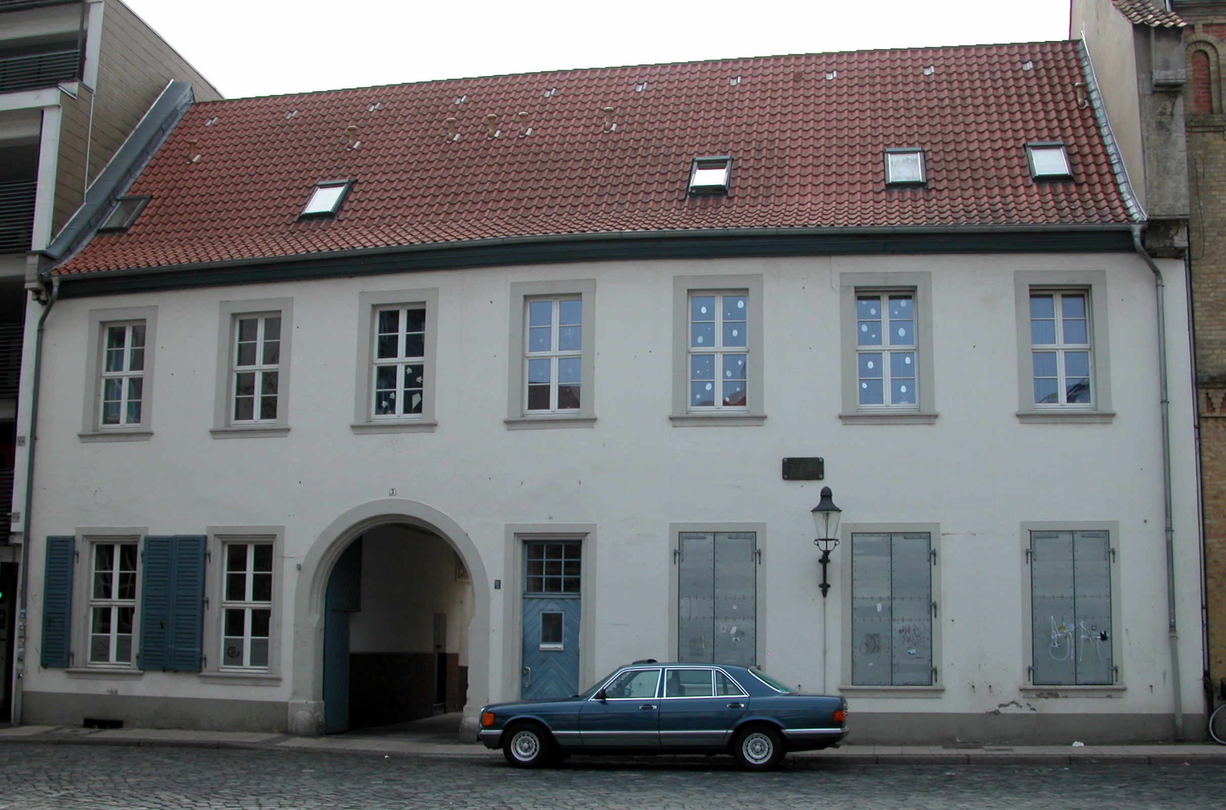 Braunschweig, Steinstraße 3 im Jahre 2011.